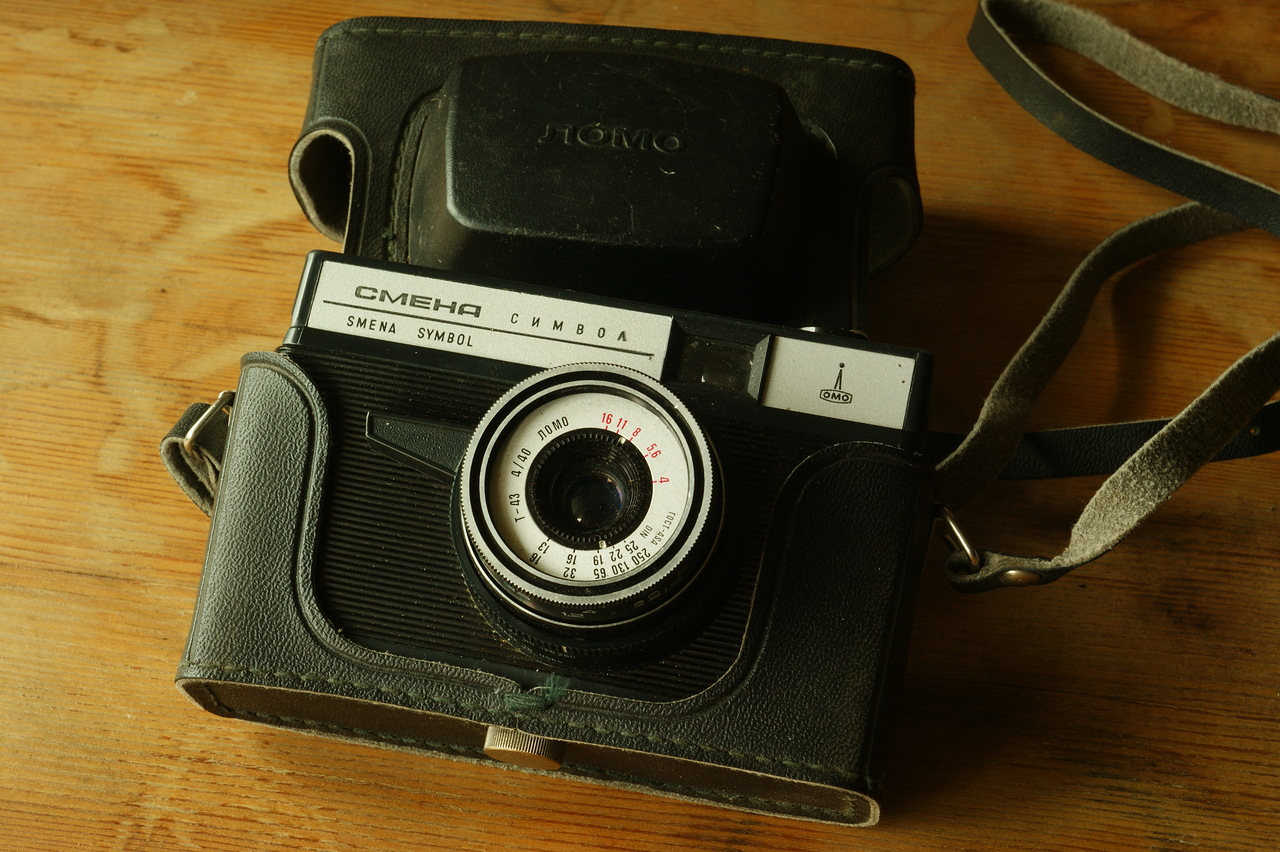 Сме́на-Си́мвол — шкальный советский фотоаппарат, выпускавшийся объединением ЛОМО в 1971—1991 годах.